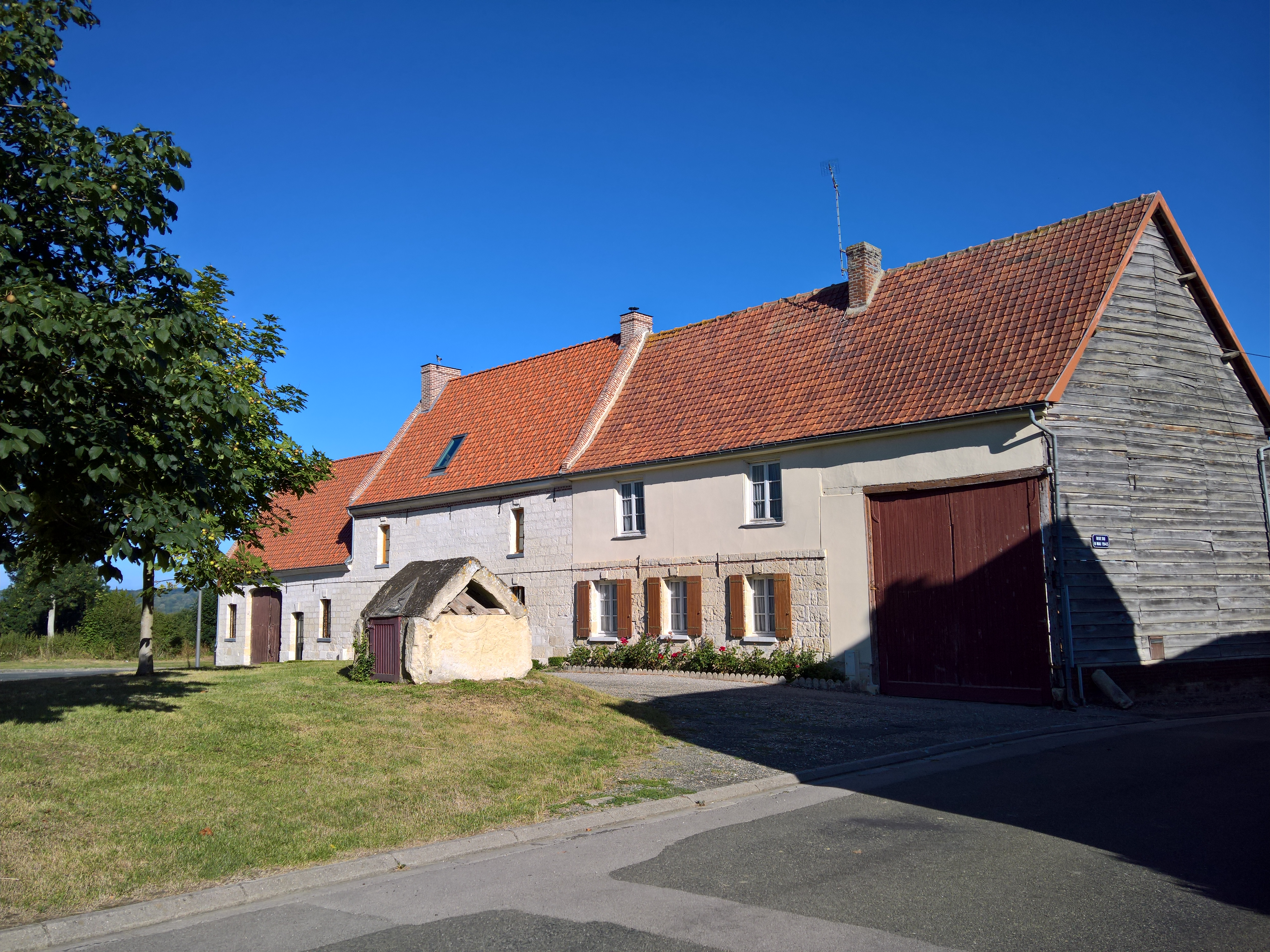 Tilloy-lès-Conty - Vieilles maisons, place de l'église